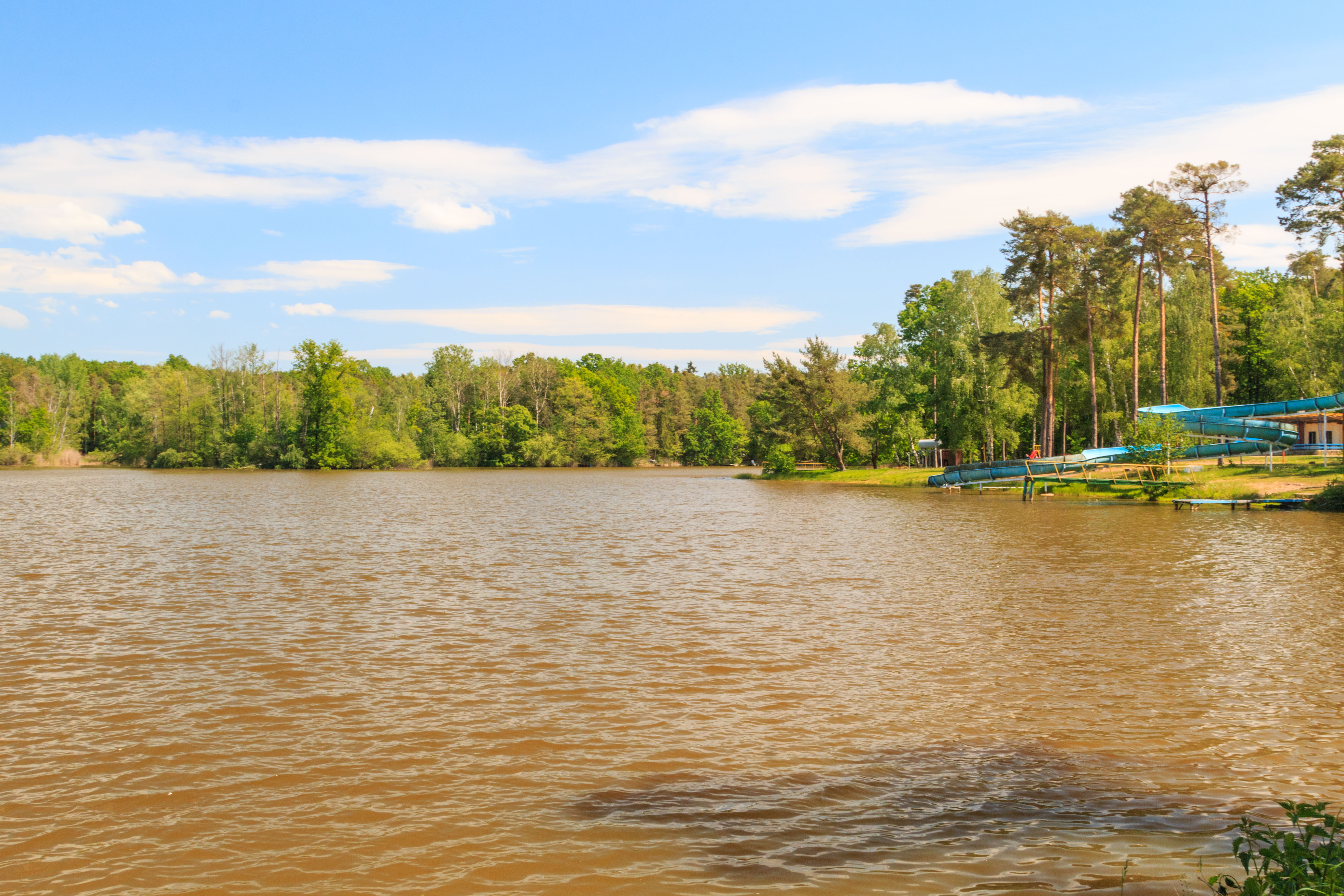 Hluboký rybník u Podlesí u Holic Project: Vodstvo.